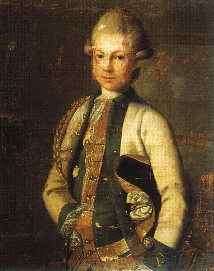 Мордвинов Николай Семенович/ Русский музей